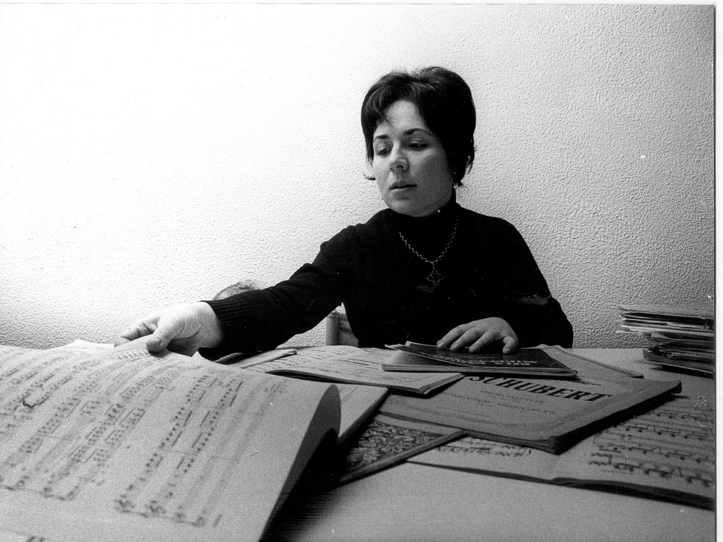 La pianista i compositora Leonora Milà mira unes partitures